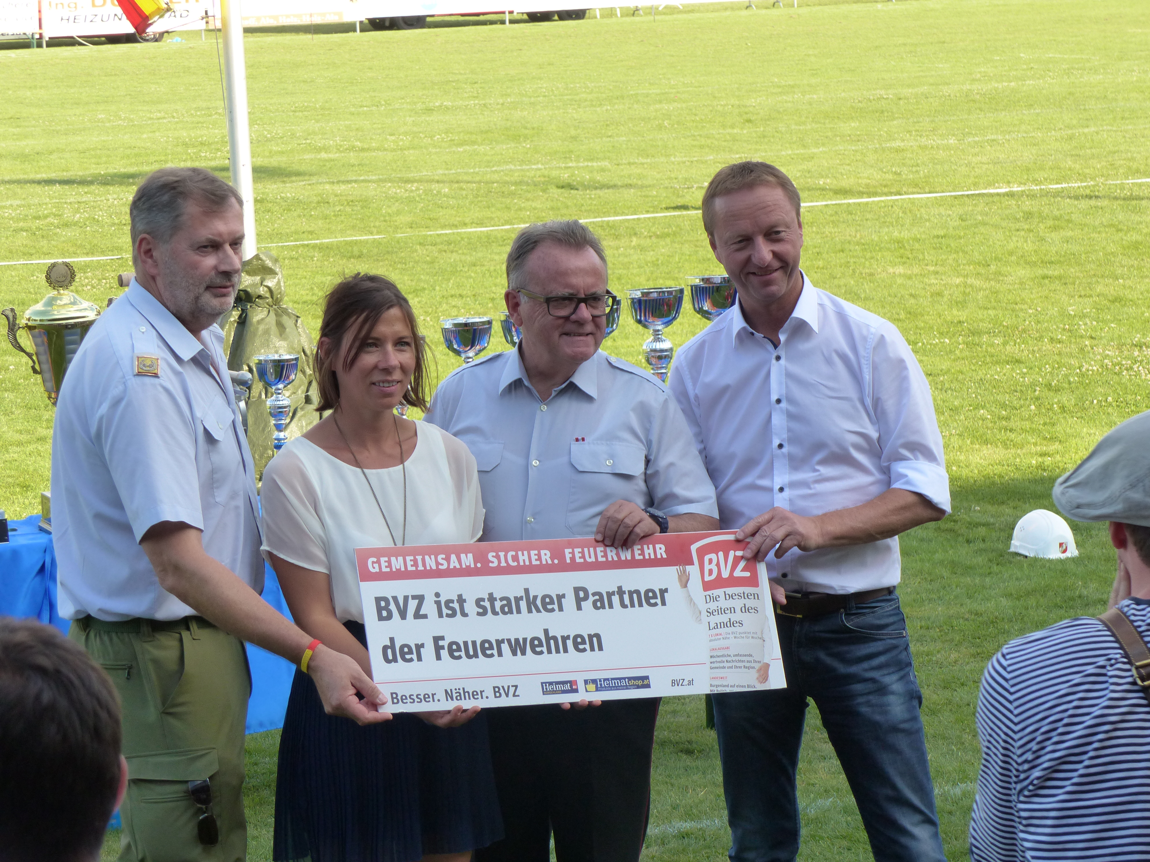 Landesfeuerwehrjugendleistungsbewerb 2016 Großpetersdorf